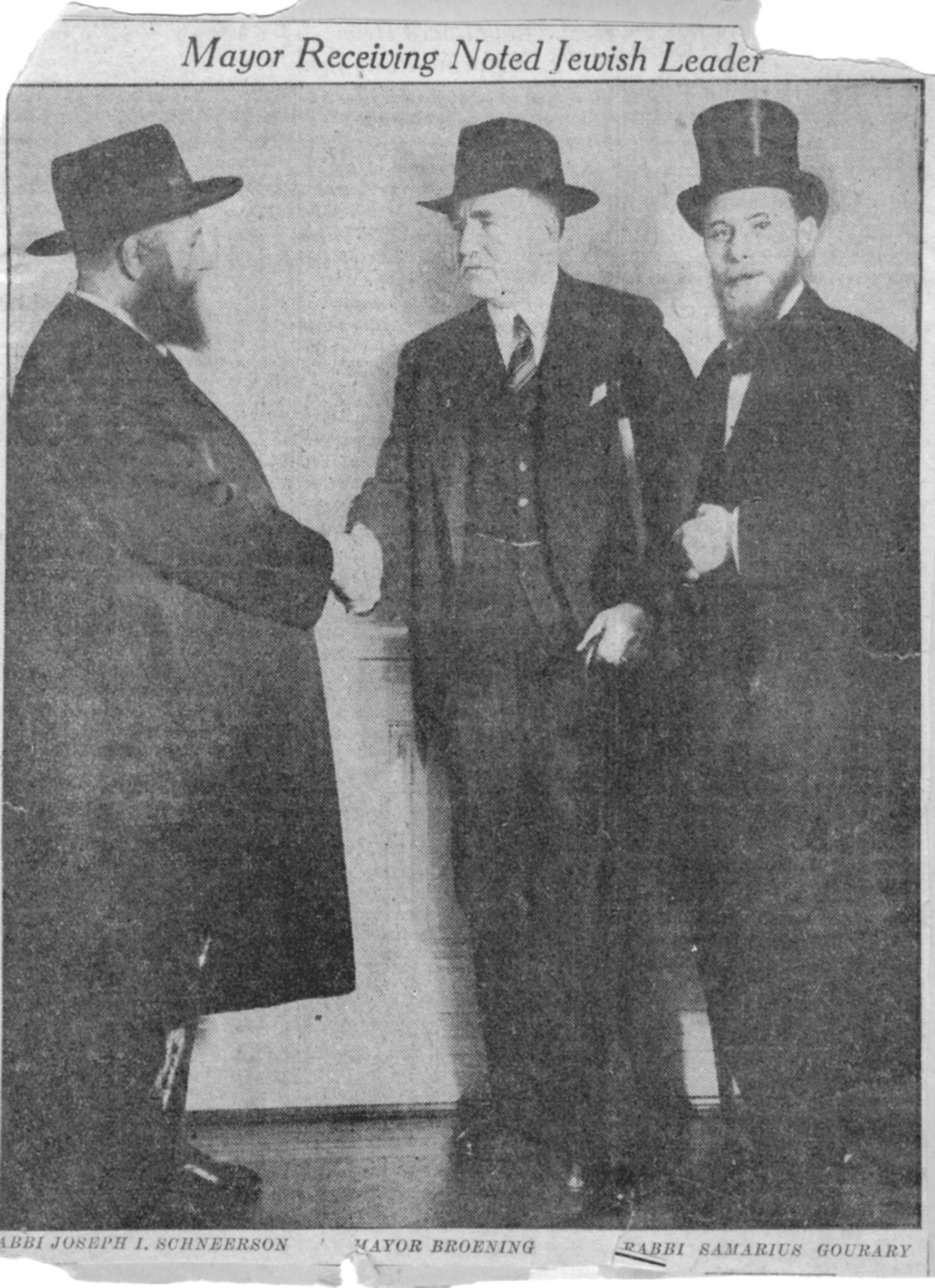 אצל ראש עיריית בולטימור